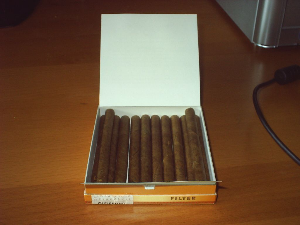 Zigarren in Verpackung.